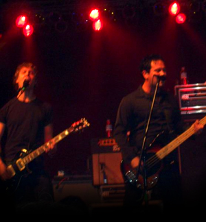 The Juliana Theory en vivo en Carrboro, NC.